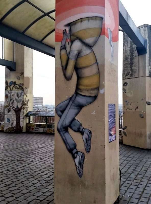 Art urbain de Julien Malland dit "Seth" sur le belvédère au parc de Belleville (20e arrondissement de Paris)